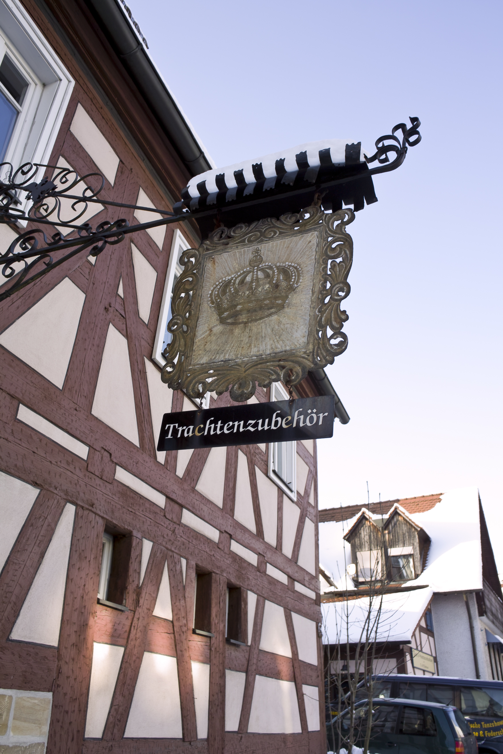 Ausleger des früheren Gasthauses Krone